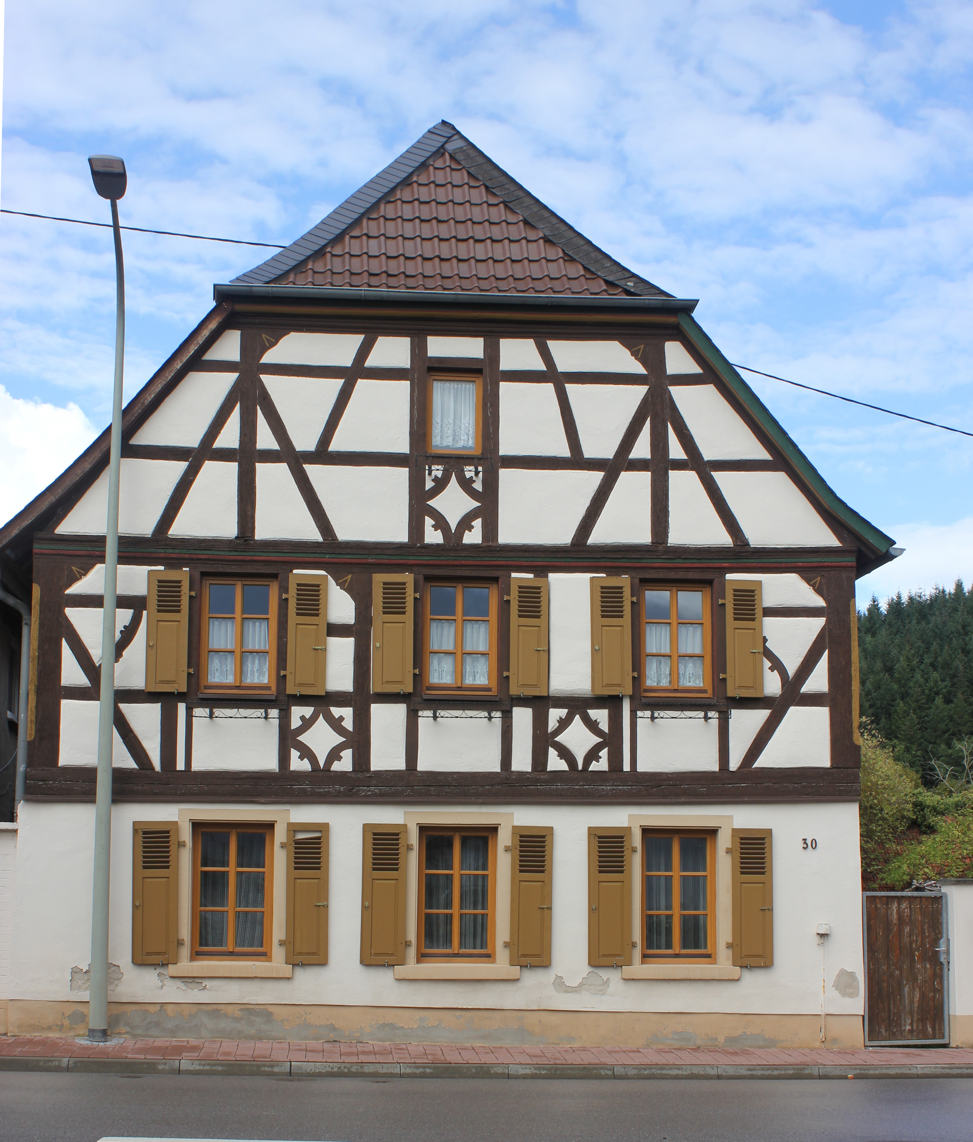 barockes Wohnhaus, teilweise Fachwerk, erste Hälfte des 18. Jahrhunderts, Umbau bezeichnet 1826; straßenbildprägend